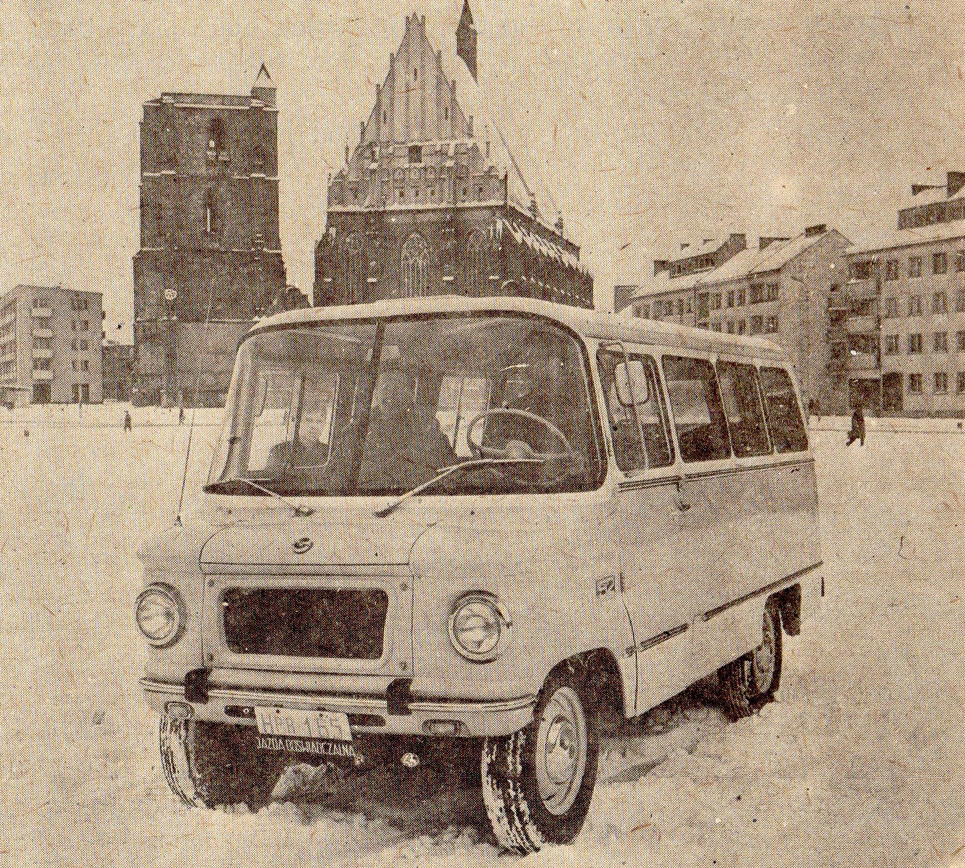 Nysa na rynku w Nysie - 1981r.